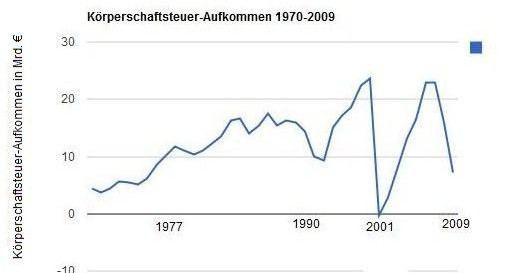 Entwicklung des Körperschaftsteueraufkommens